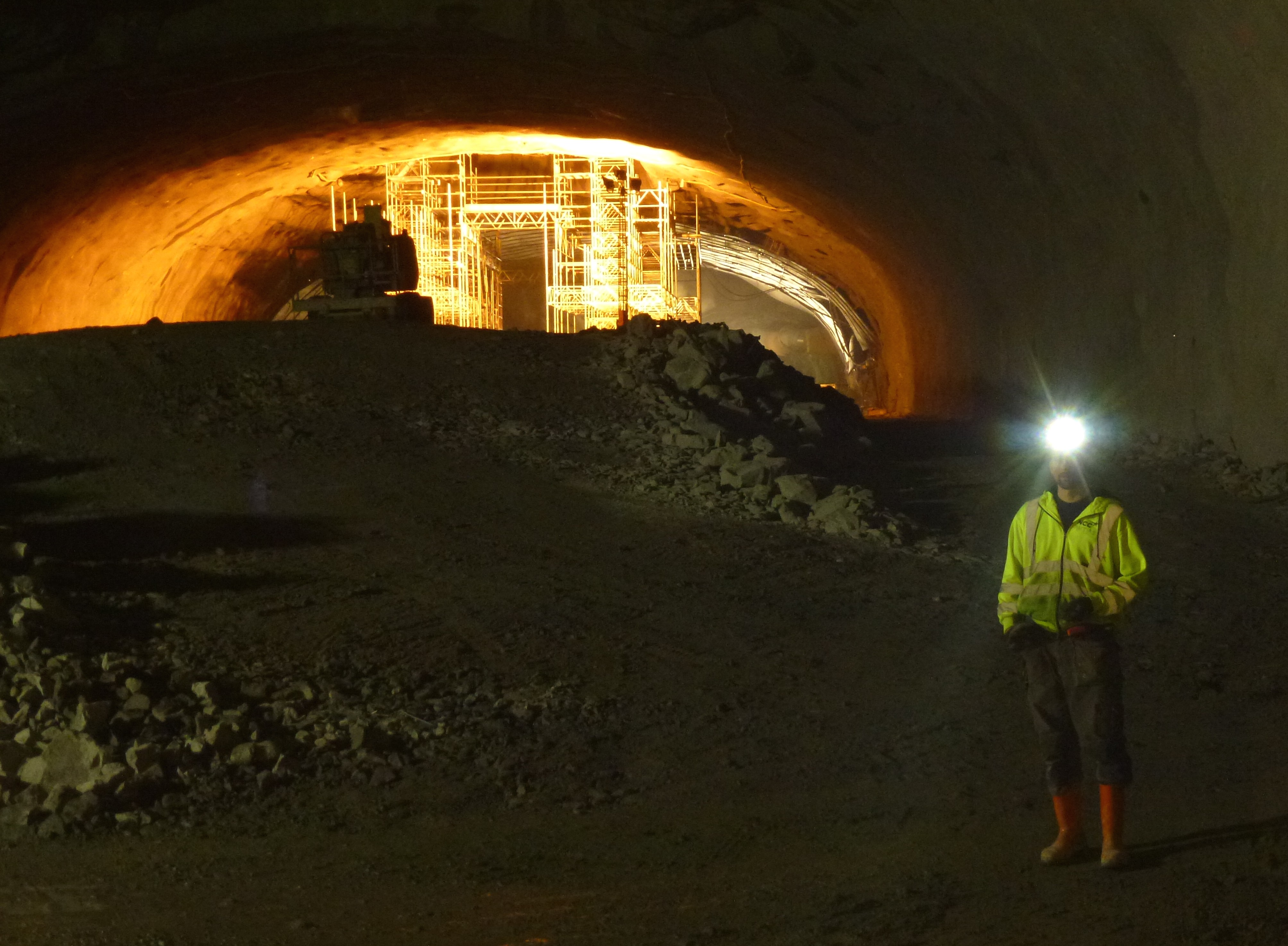 Citybanan Stockholm City pressvisning 19 oktober 2012